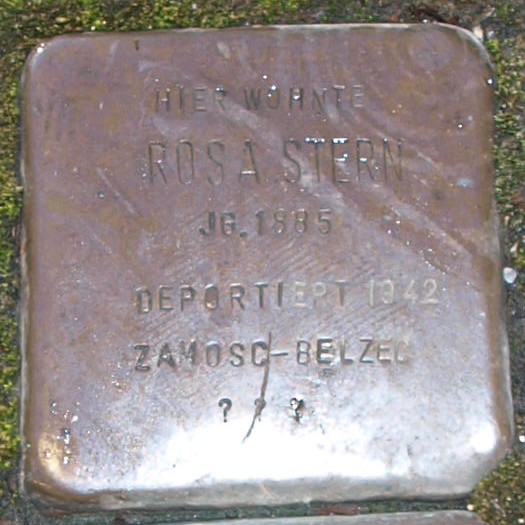 Stolpersteine in Soest Grandweg 30, Rosa Stern